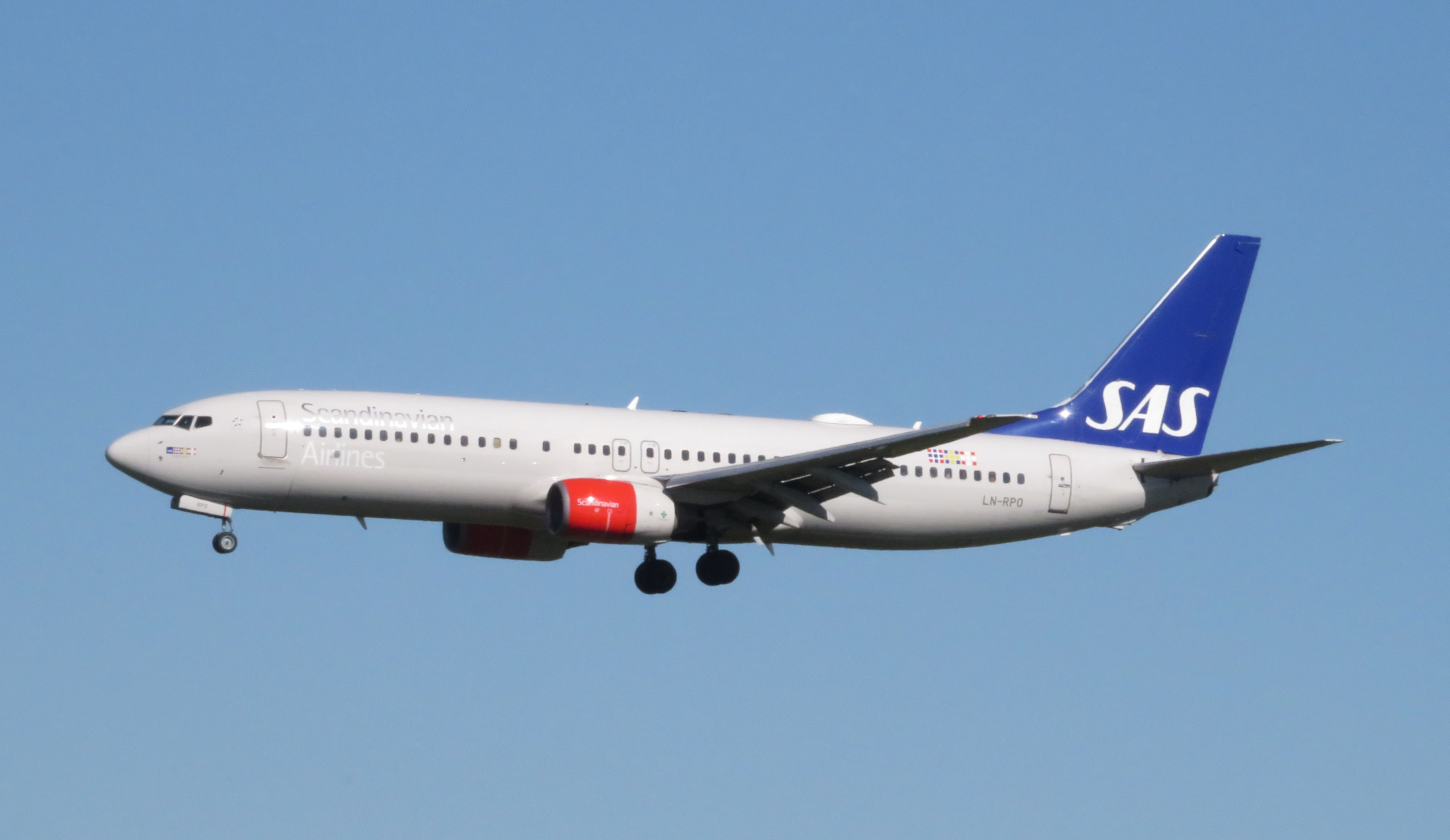 SAS B737-800 LN-RPO 2019-10-01 Munich Airport Boeing 737-883 cn/serial number: 30467/634